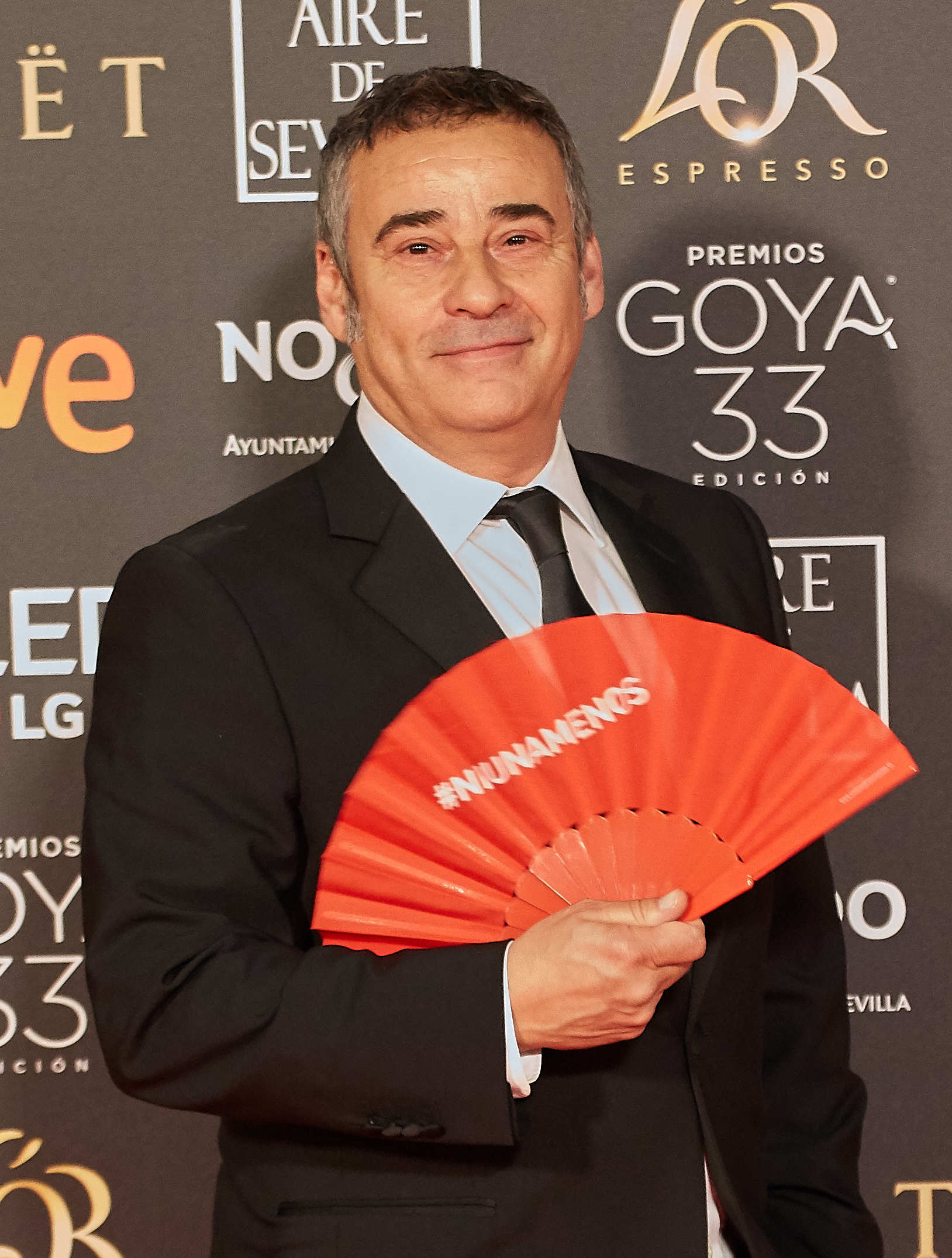 Eduard Fernandez en la alfombra roja de los Premios Goya celebrados en Sevilla en Febrero 2019